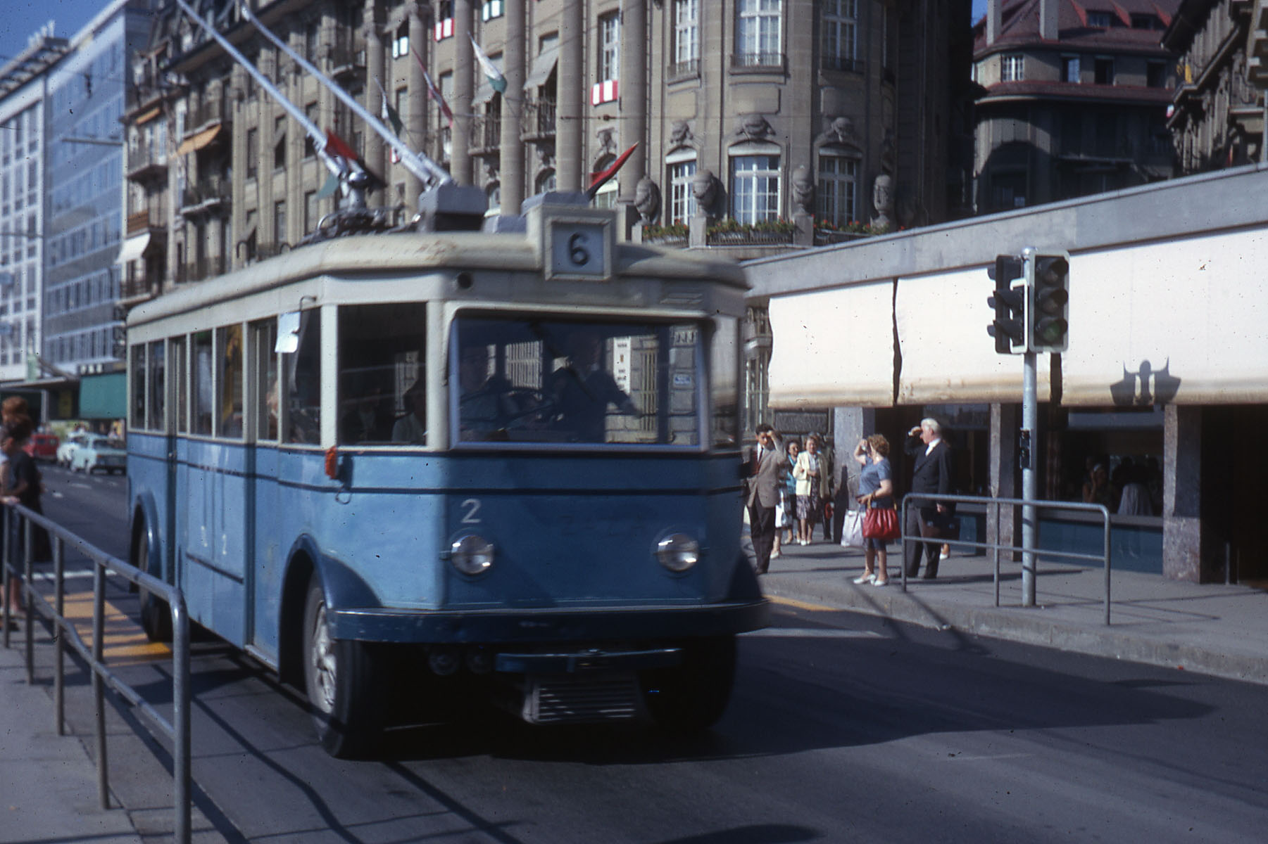 Le TL-2 premier trolleybus mis en circulation à Lausanne, ici en 1964 dernière année de circulation en service